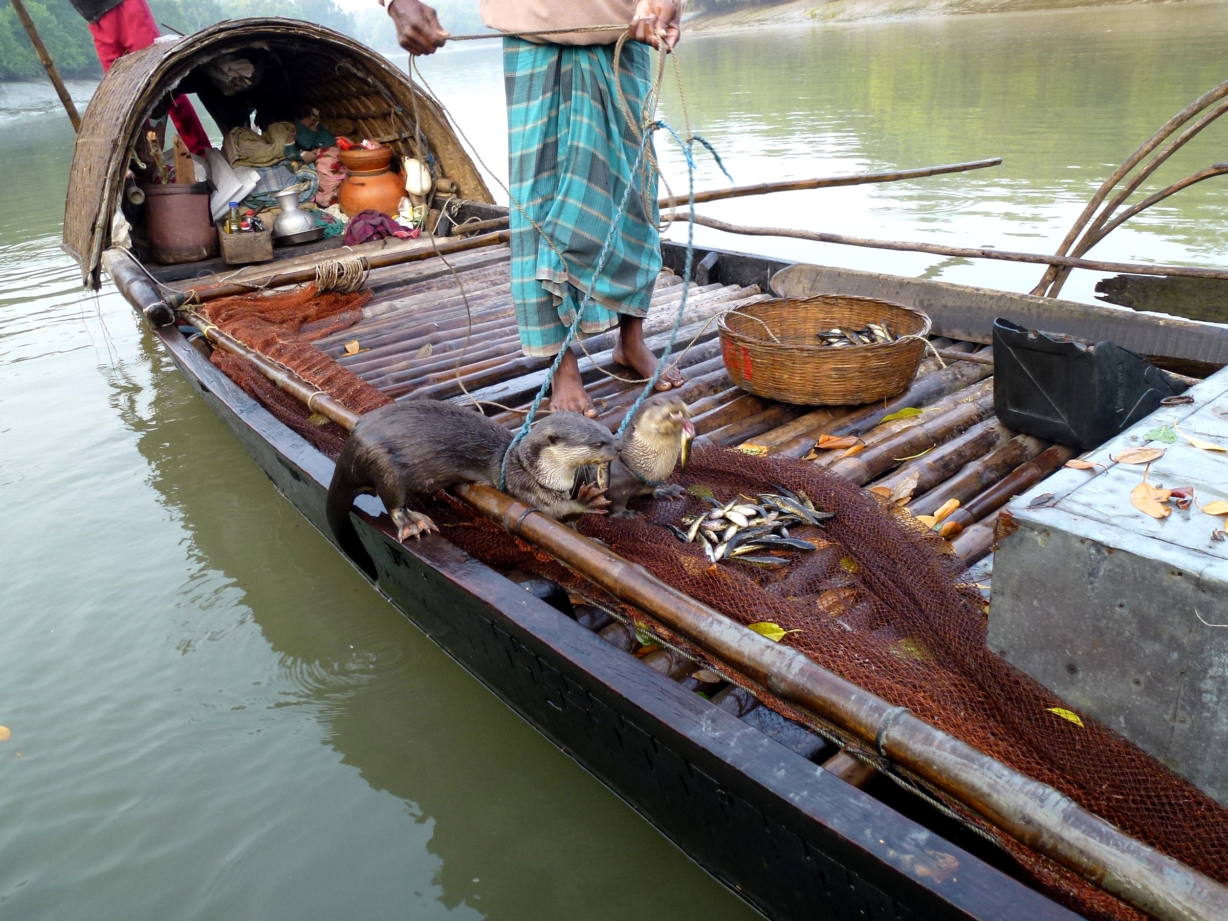 Otter Fishermen Harbaria Sundarban National Park Bangladesh